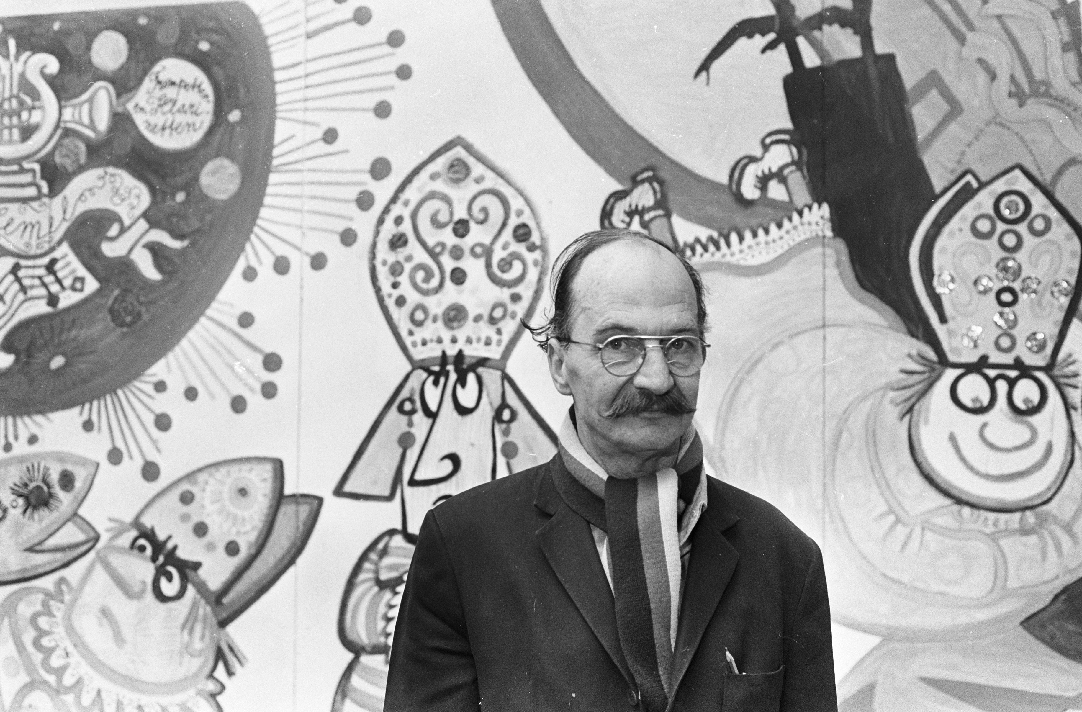 Collectie / Archief : Fotocollectie Anefo Reportage / Serie : [ onbekend ] Beschrijving : In nieuwe vleugel Stedelijk Museum Amsterdam wordt een zaal ingericht voor het Boekenbal. Organisator, schilder Metten Koornstra voor een schilderij van Hofland Datum : 28 februari 1969 Locatie : Amsterdam, Noord-Holland Trefwoorden : musea, schilderijen, schilders Persoonsnaam : Koornstra, Metten Fotograaf : Verhoeff, Bert / Anefo Auteursrechthebbende : Nationaal Archief Materiaalsoort : Negatief (zwart/wit) Nummer archiefinventaris : bekijk toegang 2.24.01.05 Bestanddeelnummer : 922-1500